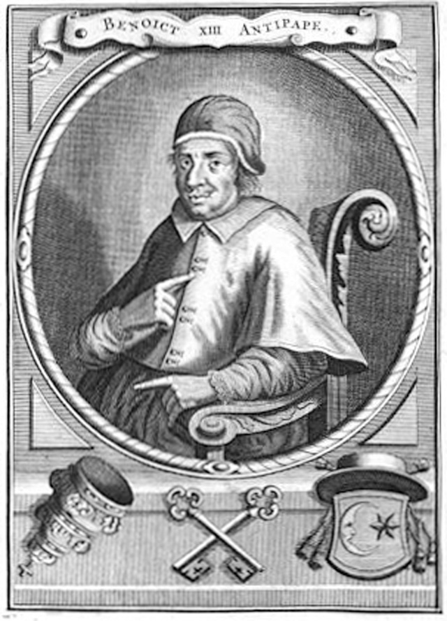 Benoît XIII, le pape de la lune